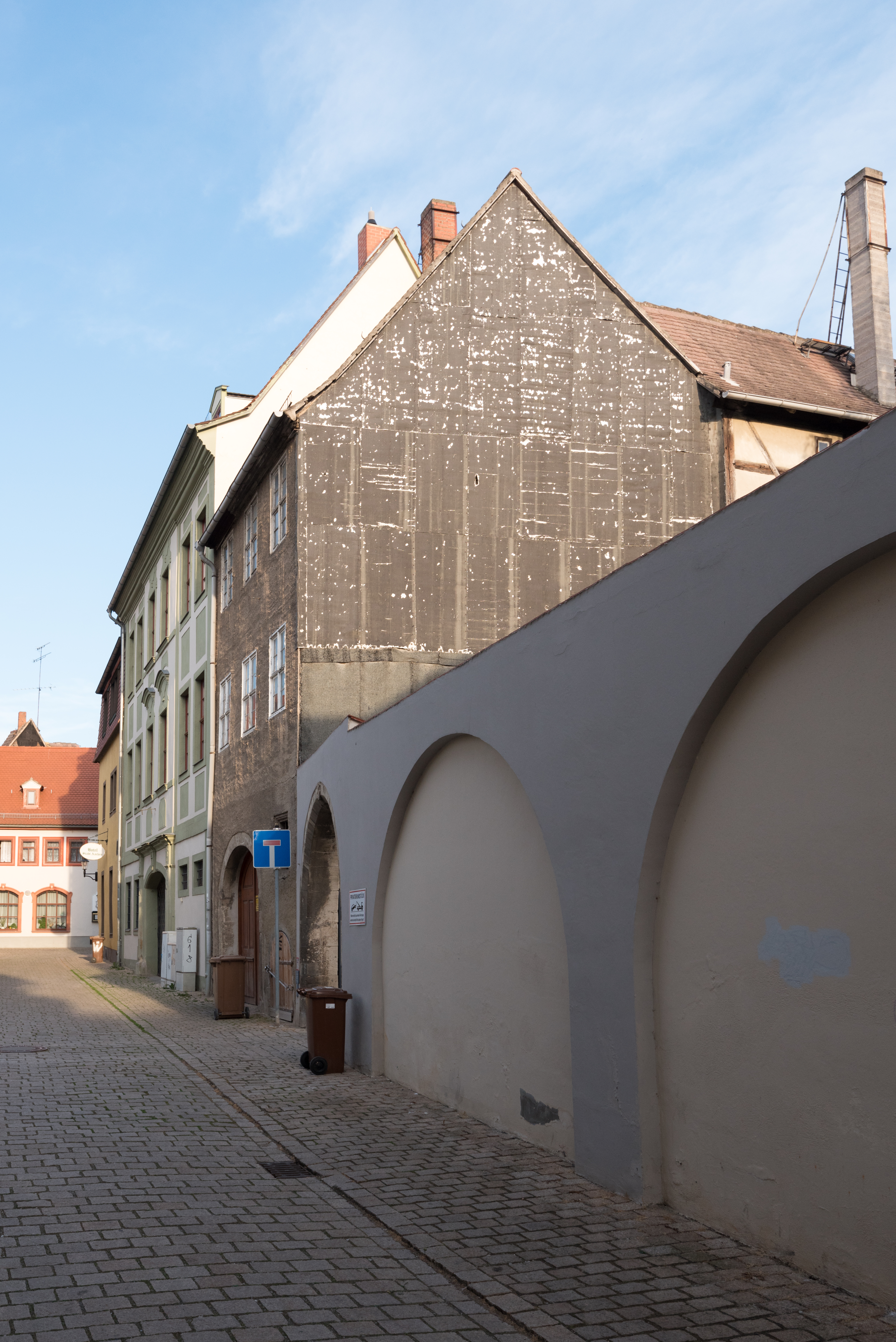 Naumburg (Saale), Mariengasse 13, 12